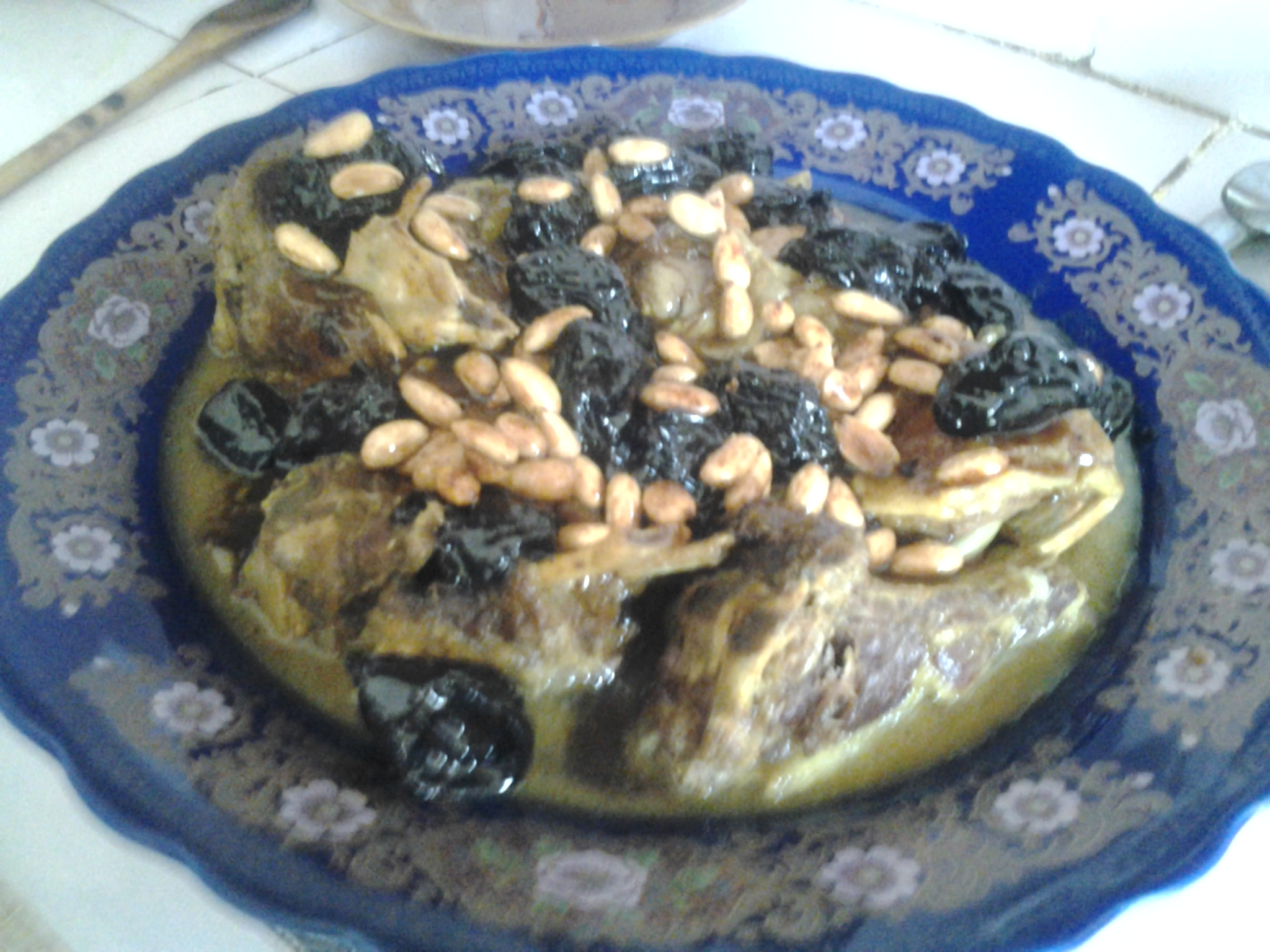 اللحم بالبرقوق و اللوز aid l adha This is an image of food from Morocco